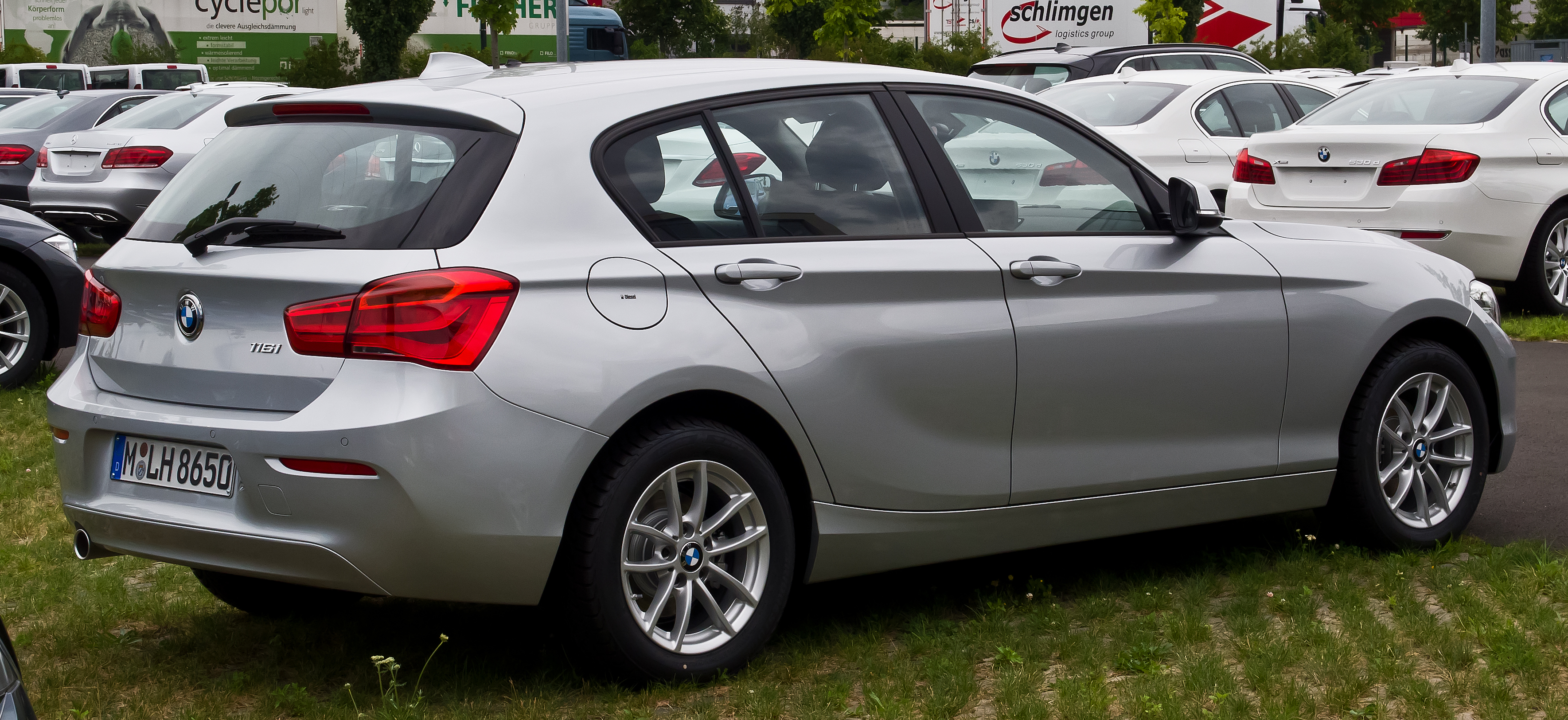 BMW 116i (F20, Facelift)